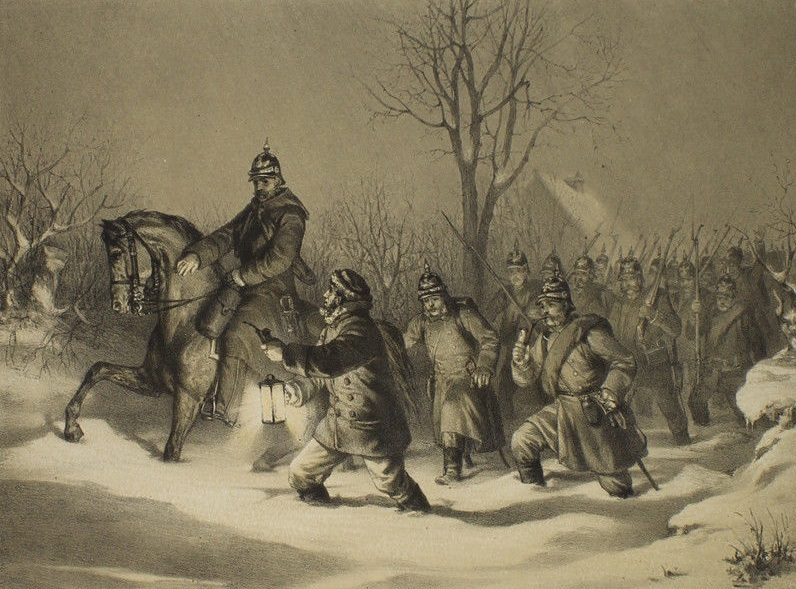 Marsch durch den Schnee, wahrscheinlich in der Nacht vom 5-6. Febr 1864